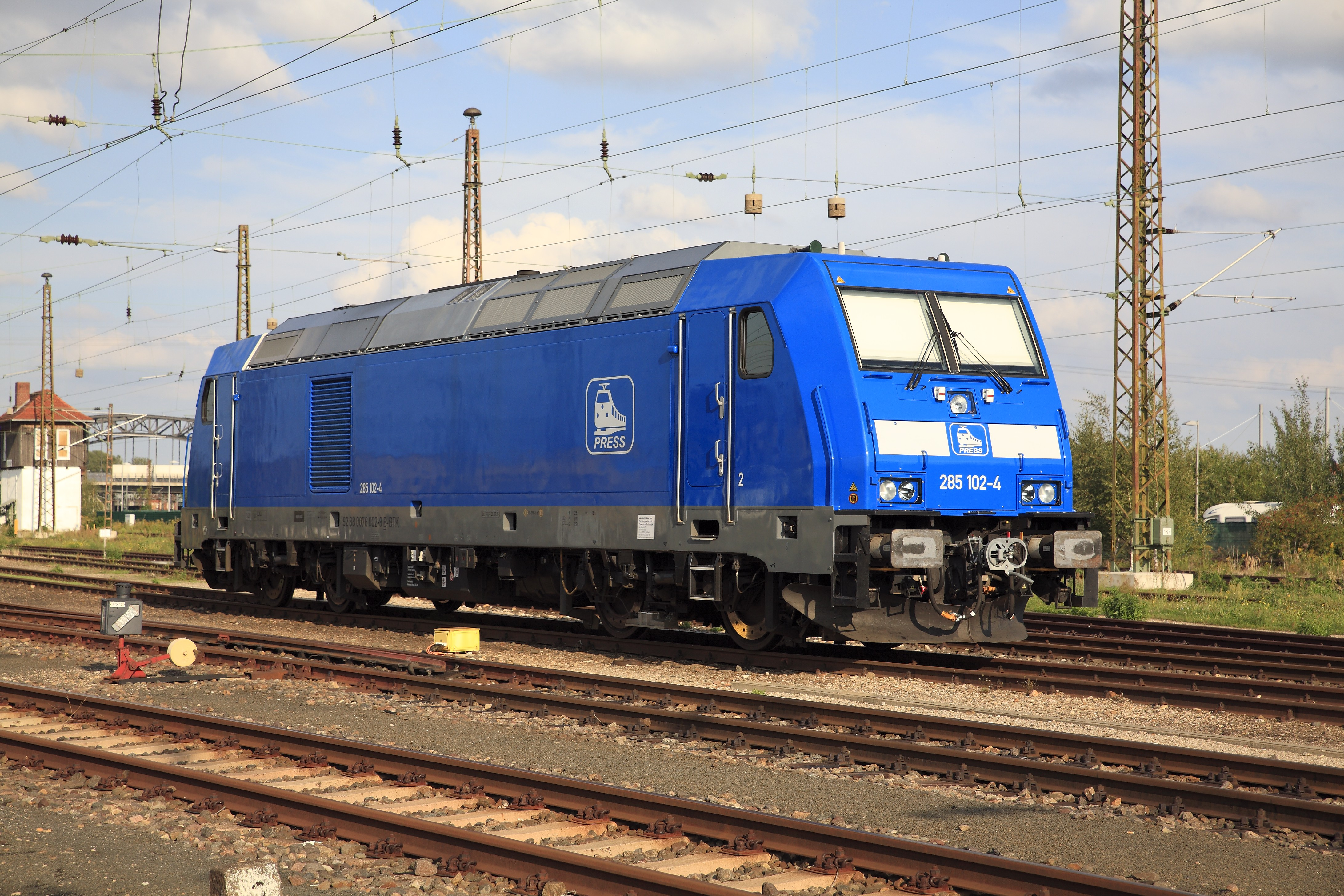 Eingestellt bei der Pressnitztalbahn für Hilfsdienste auf der Schnellfahrstrecke Erfurt–Halle/Leipzig. Dafür wurde die Maschine mit ETCS ausgerüstet. An beiden Enden sind Scharfenberghilfskupplungen aufgesetzt. Links im Hintergrund das ehemalige Stellwerk 11. Die Lokomotive stammt aus einer Bestellung aus Belgien, die dann nicht abgemnommen wurde. Die Lokomotiven wurden jedoch schon in Belgien zugelassen, daraus resultiert die UIC-EDV-Nummer 92 88 0076 002, die in Deutschland völlig aus dem System fällt. Die darüber angebrchte Nummer 285 102 ist nur eine unternehmensinterne Bezeichnung der Press.